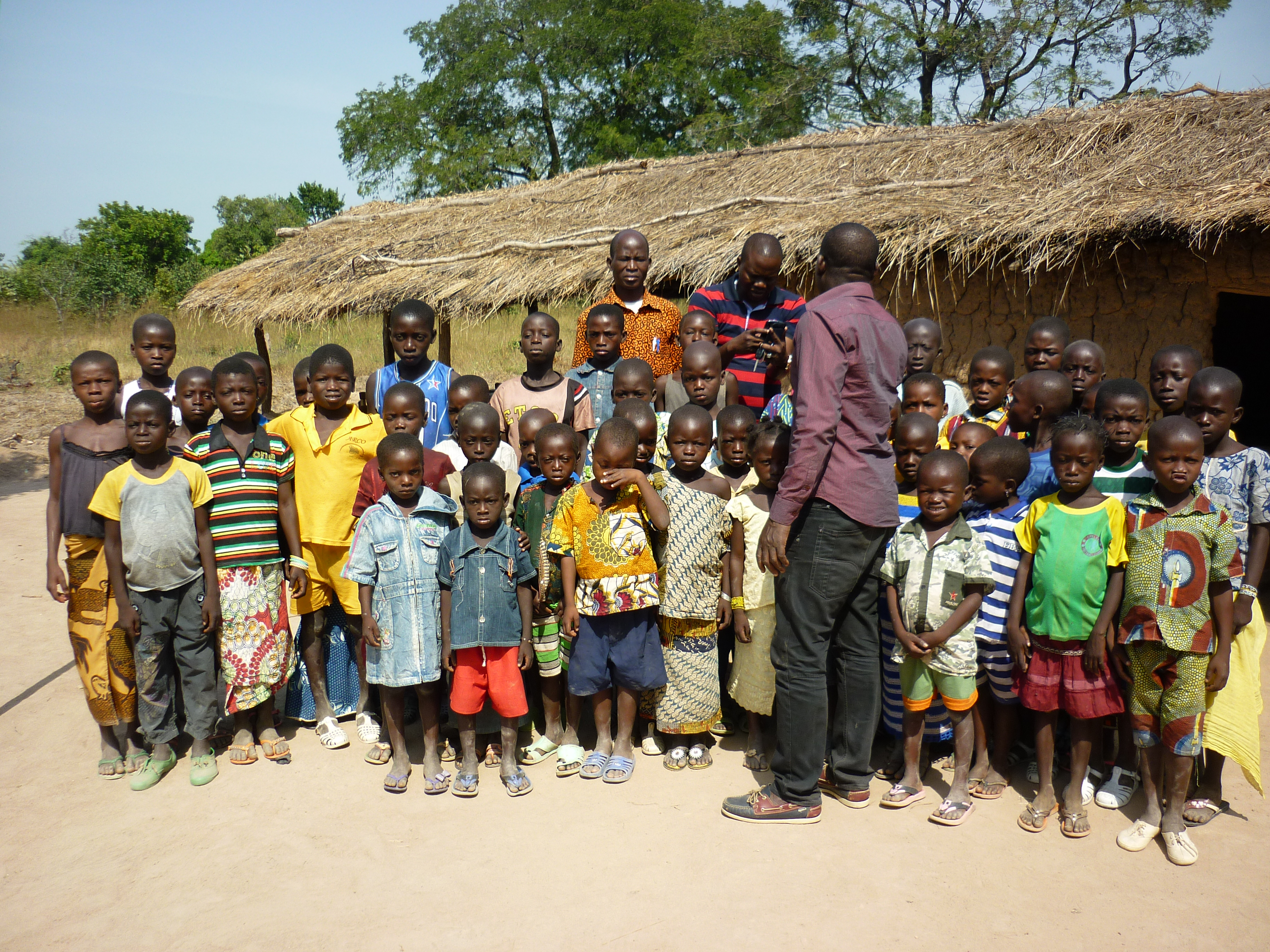 Un enseignant dans une zone rurale de la Côte d'Ivoire avec une classe de primaire This is an image of "African people at work" from Ivory Coast